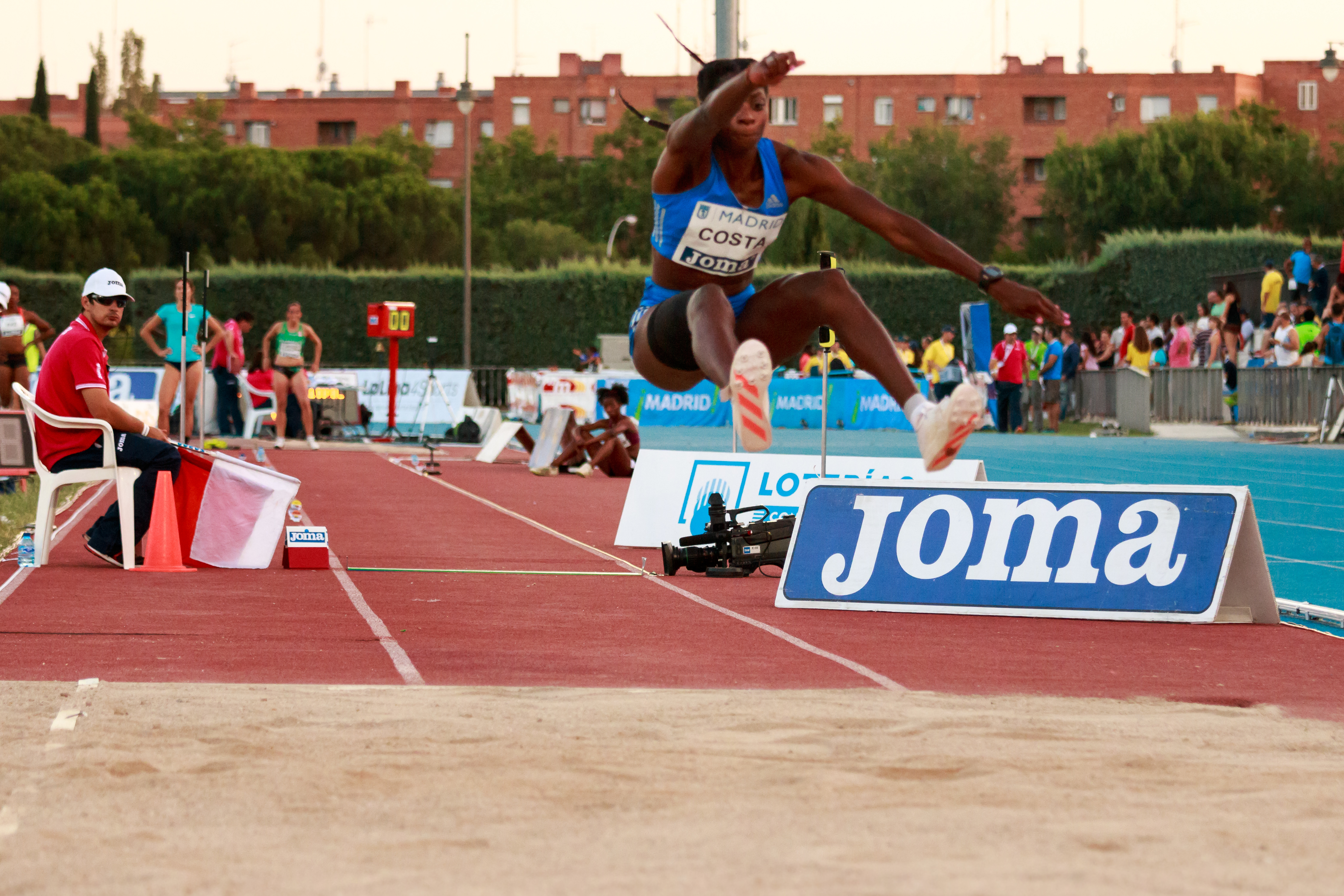 Susana Costa (POR). Triple salto. IAAF World Challenge. Meeting Madrid 2017. Moratalaz, Madrid.